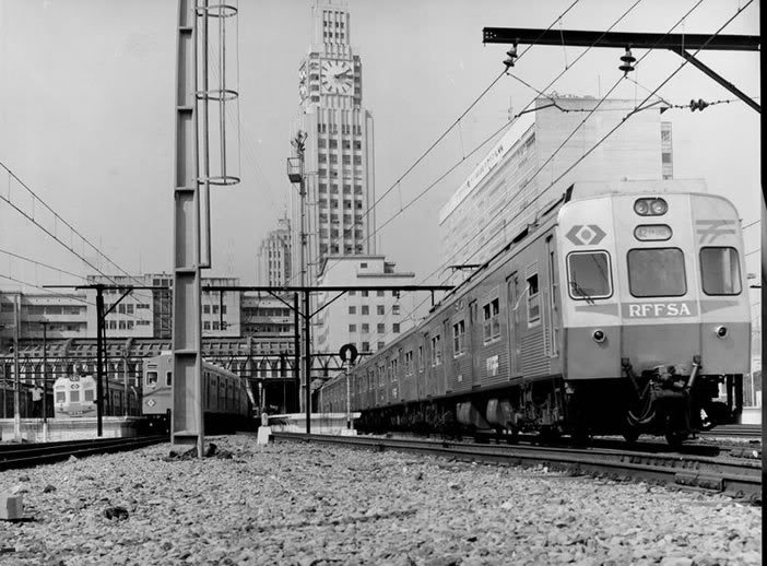 O Trem MAN/Santa Matilde Série 800 partindo da Estação Central do Brasil. Ao fundo, trens das Série 400 M e 900.